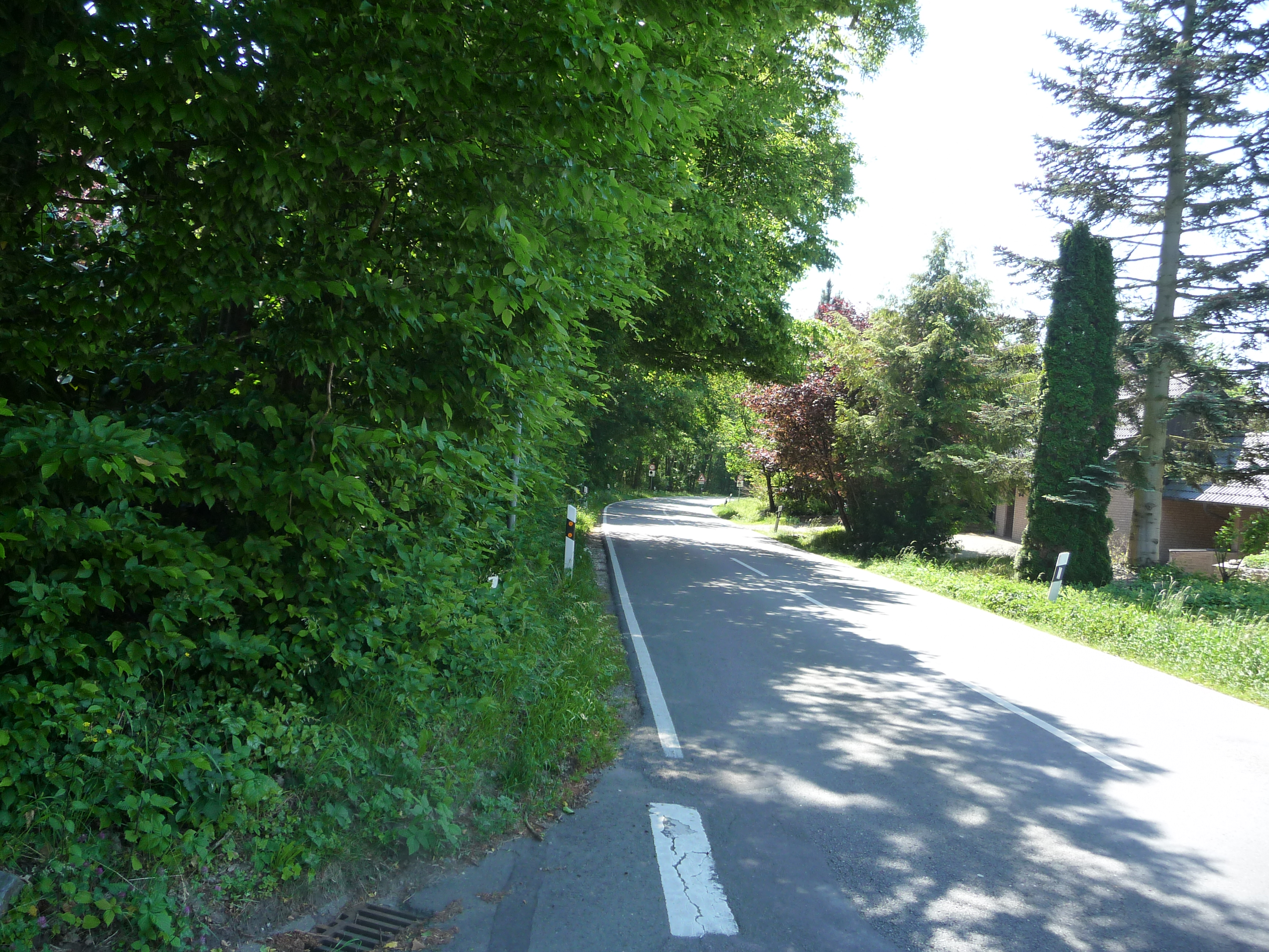 Zwischen St. Annen und Wallenbrück liegendes Naturschutzgebiet - vornehmlich Wald.